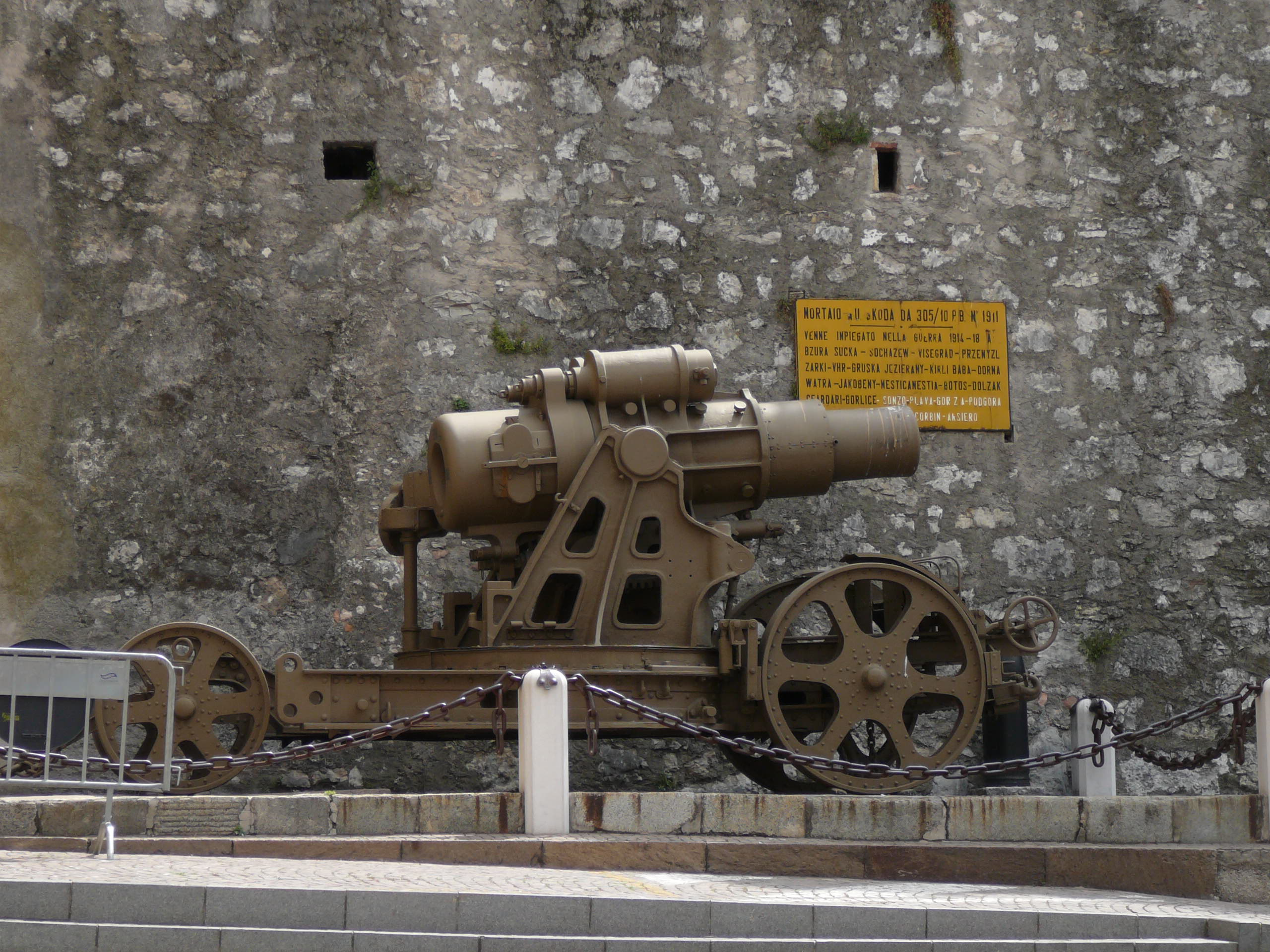 Škoda 305 mm Model 1911 a Rovereto (TN)